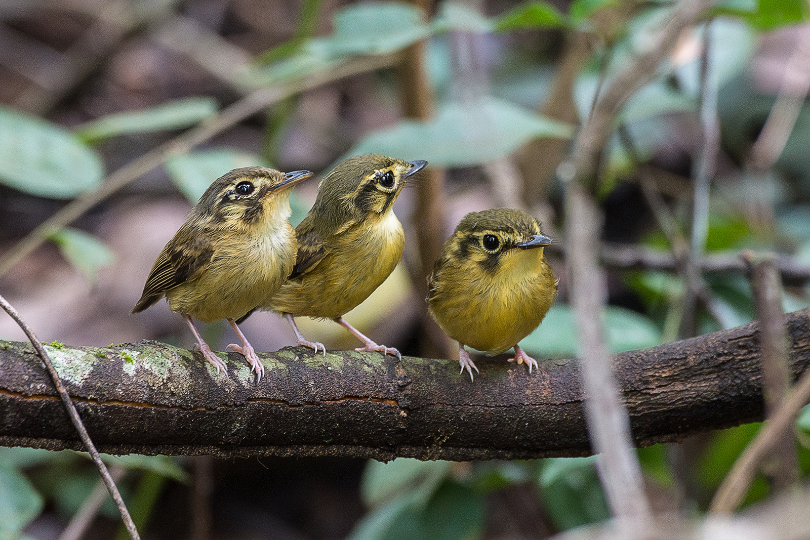 O título desta imagem faz referência aos três sobrinhos do Pato Donald (Huguinho, Zezinho e Luisinho). Escolhi esse título por causa do nome popular da espécie mostrada na imagem (patinho). Depois de seguir esse bando de patinhos (Platyrinchus mystaceus) pela mata durante algumas horas, me deparei com essa magnífica cena. Foi só alegria....